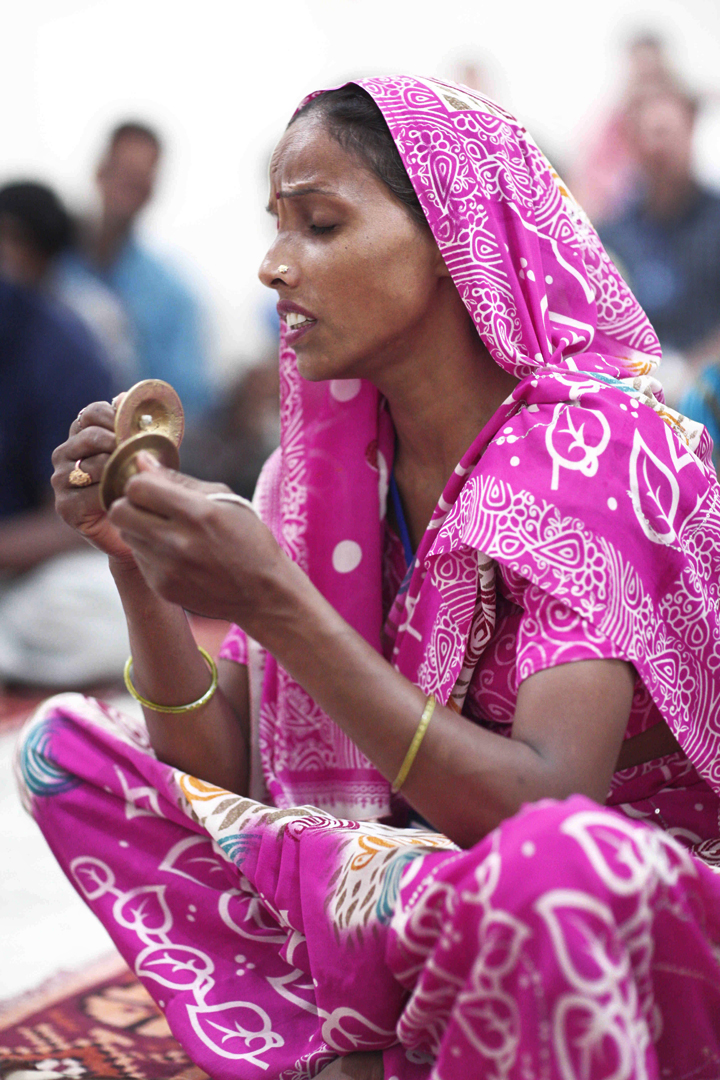 1001 India